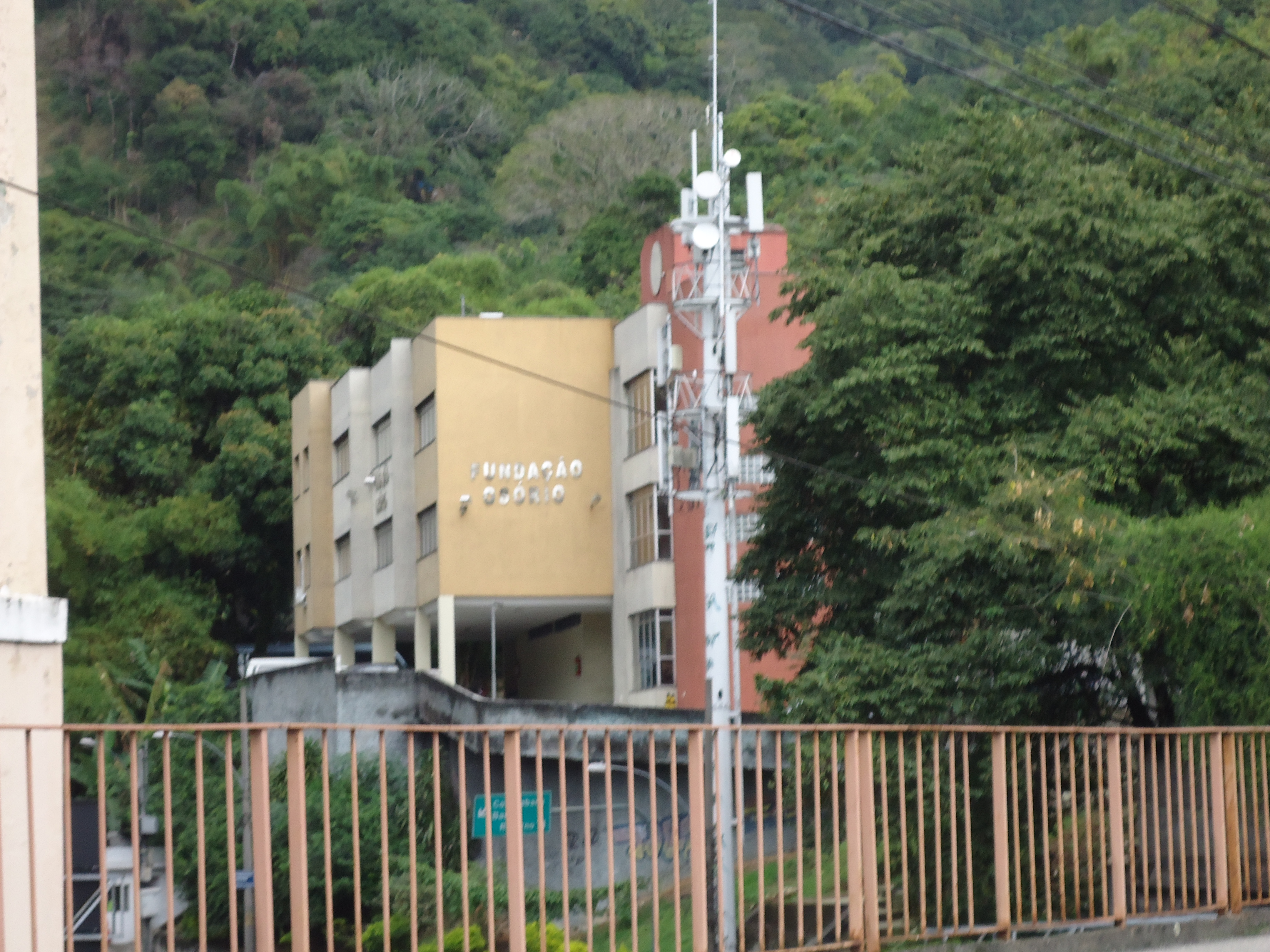 Fundação Osório, Rio Comprido, Rio de Janeiro, RJ, Brasil: vista do prédio novo.